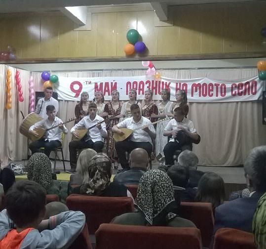 Чернолик 9 Май